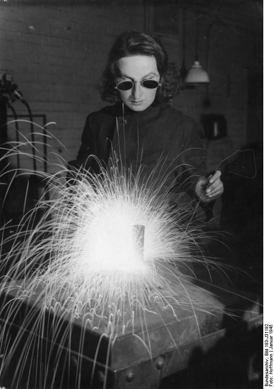 Schweißerin Scherl Bilderdienst Vom Laboratorium an die Werkbank Immer wieder hört man heute von Fällen, in denen Frauen und Mädchen die Plätze gefallener Männer und Brüder einnehemen, um so das Lebenswerk der Toten fortzusetzen. Auch Hildegard E. ist ohne zu zögern in die Bresche gesprungen, als eines Tages die Nachricht eintraf, das ihr einzigerr Bruder an der Front gefallen sei. Für sie stand es fest, daß das Lebenswerk des Vaters, ein großes Metallkontruktionswerk, das ursprünglich der Gefallenen fortführen sollte, nicht in fremde Hände fallen dürfte. Und so gab sie, die als medizinische Assistentin im Kaiser-Wilhelm-Institut beschäftigt war, ihre dortige Arbeit auf, um in der Meisterschule des gestaltenden Handwerks sich in einer dreijährigen Lehre als Bau- und Kunstschlosserin die Kenntnisse anzueignen, die sie als zukünftige Betriebsführerin benötigt. U.B.z.: Wie ein "Alter" versteht die junge Schweißerin es bereits, mit dem Schweißgerät umzugehen. Auch in sogenannten "Männer"berufen zeigen die Frauen, daß sie gut und verantwortungsvoll zu arbeiten verstehen. Aufnahme: Hoffmann ADN-ZB-Archiv II.Weltkrieg 1939-1945 Faschistisches Deutschland im letzten Kriegsjahr; Januar 1945: Immer mehr Frauen mußten schwere Männerarbeit übernehmen. So arbeitet Hildegard E. als Schweißerin..